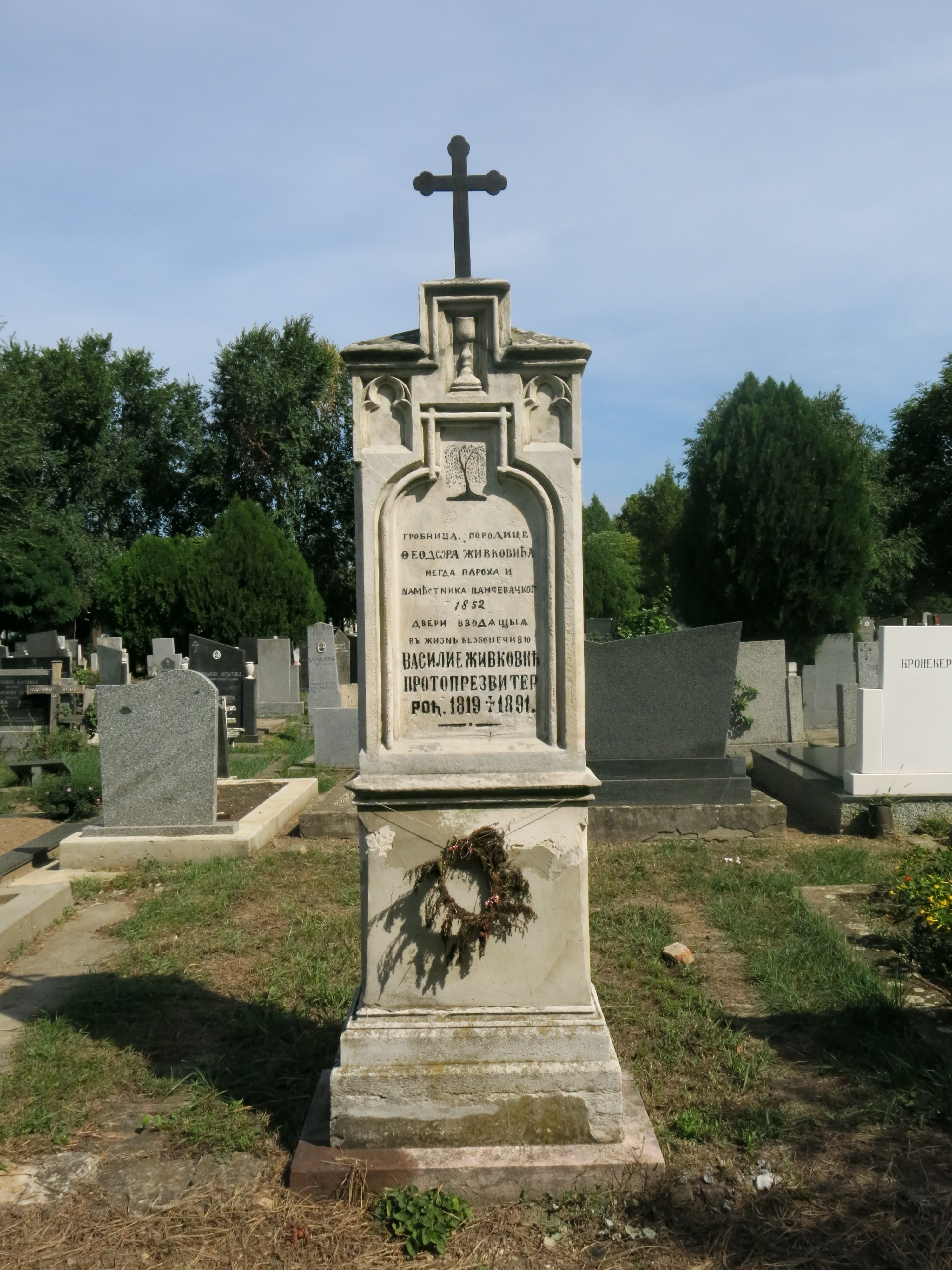 Надгробни споменик Василија Живковића